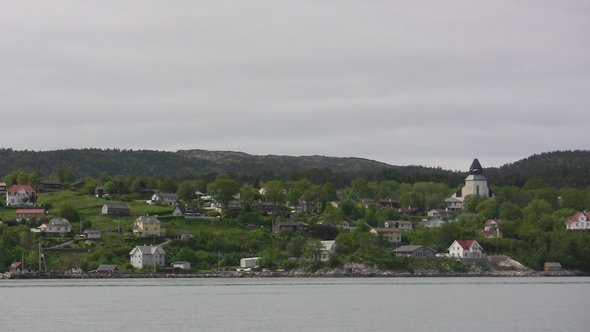 Klokkarvik, Sund, Hordaland, Norway